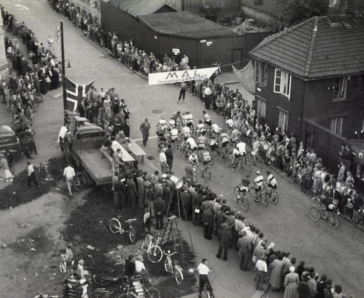 Sagene Idrettsforenings sykkelgruppes gateritt. Start og mål var i krysset Mogata-Skiensgata. Løypa gikk forbi Sagene kirke ned til Iladalen, opp Uelands gate, inn Mogata og ble avsluttet med spurt under målseglet. Skiensgata gikk mellom og parallelt med Kristiansandgata og Drøbakgata, og forsvant i slutten av 1970-årene i forbindelse med byggingen av kvartalet nord for Gråbeinsletta, der sagene terrasse og høyblokken Drøbakgata 1 inngår. Foto: Odd Ellingsen, ca. 1950. Fra Oslo Museums samling.